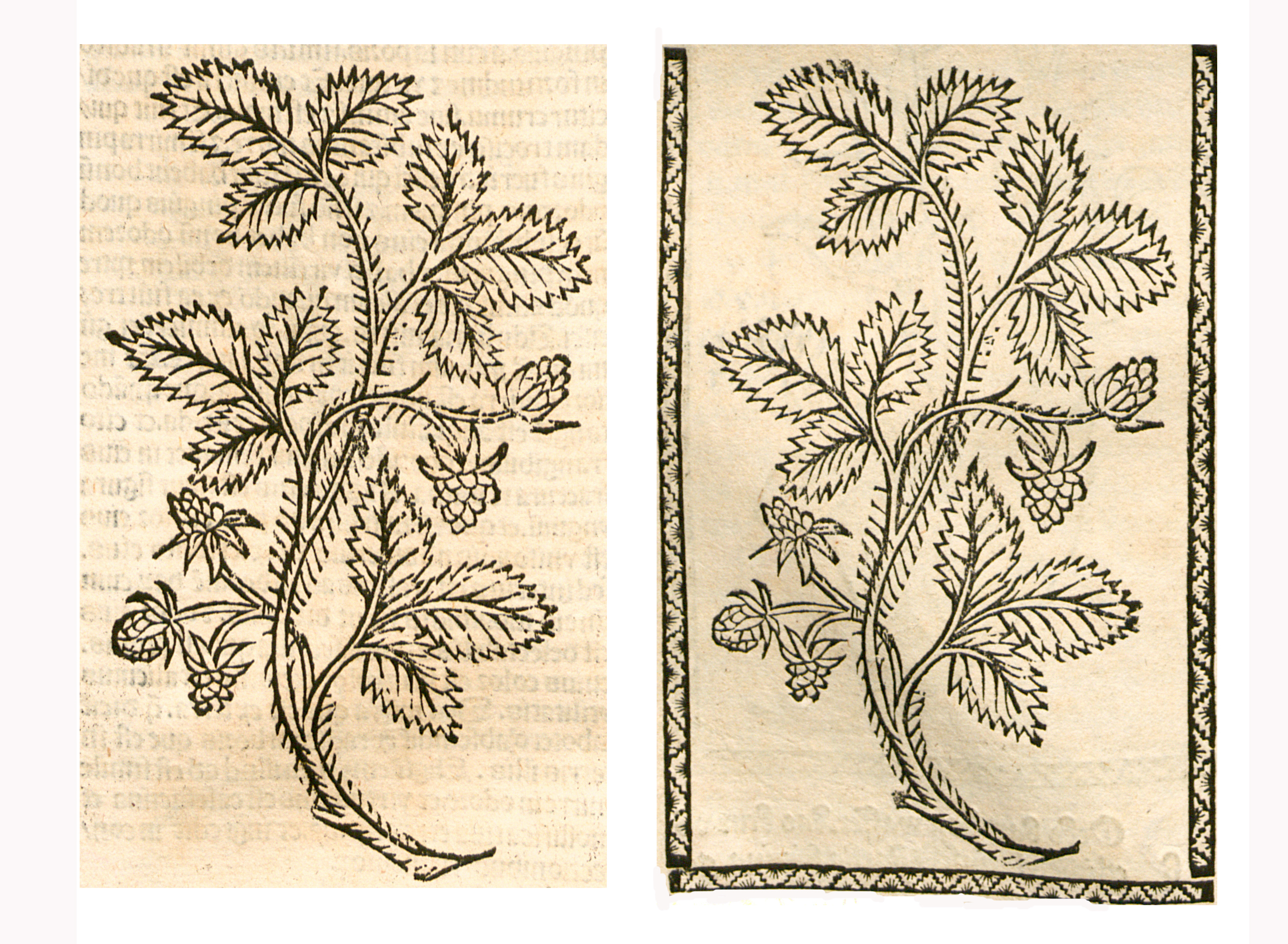 Abbildung von: Brombeer